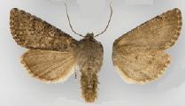 Lasionycta subalpina male